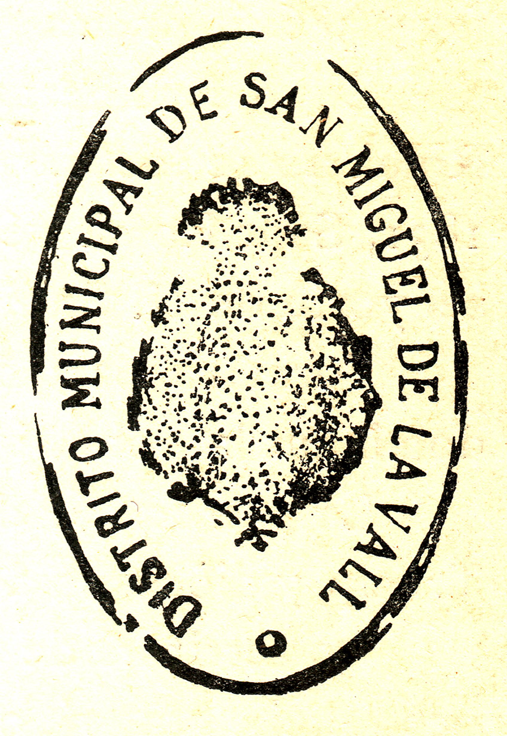 Escut municipal de Sant Miquel de la Vall (Aransís, Gavet de la Conca, Pallars Jussà)